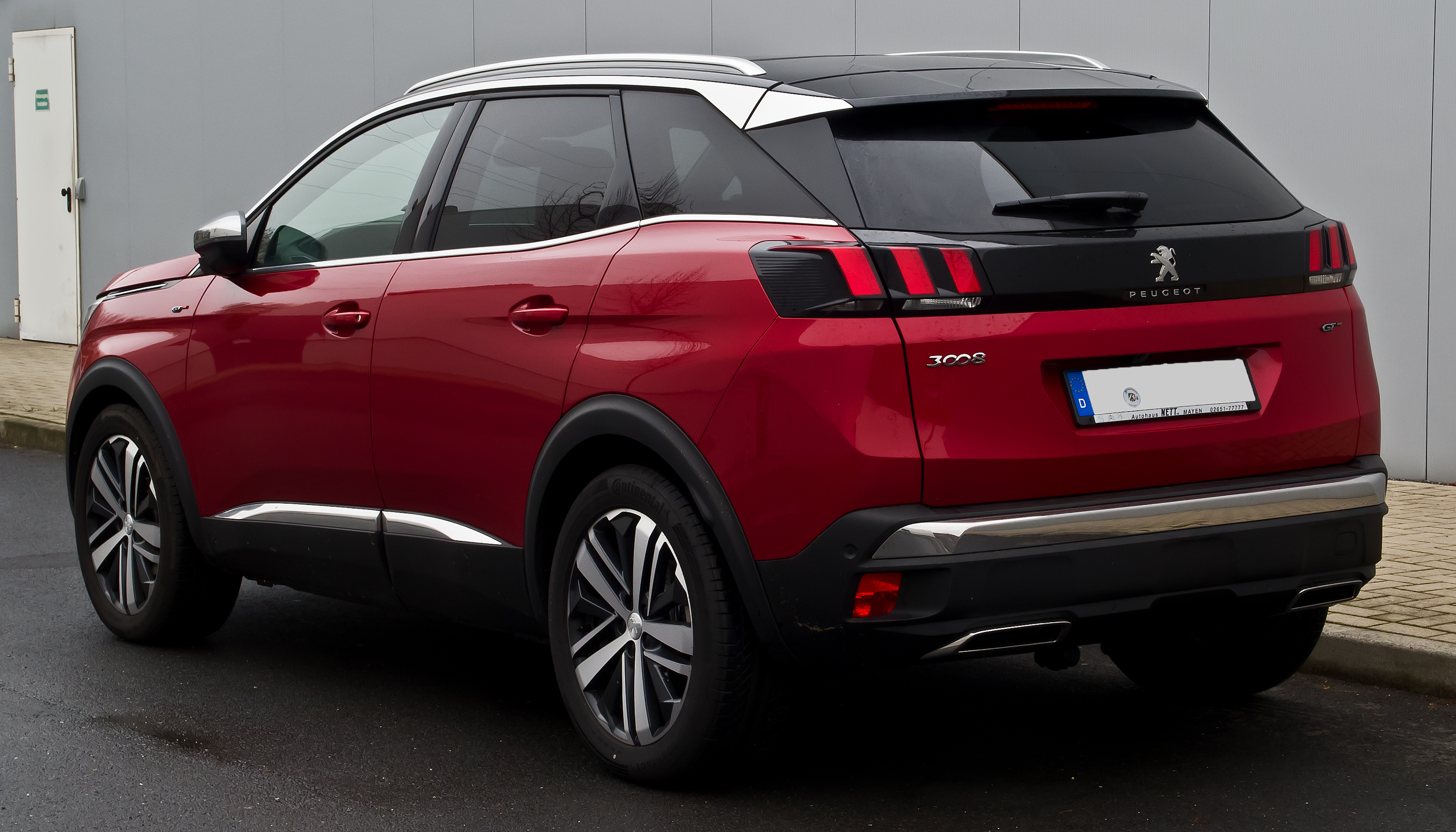 Peugeot 3008 BlueHDi 180 EAT8 GT (II)